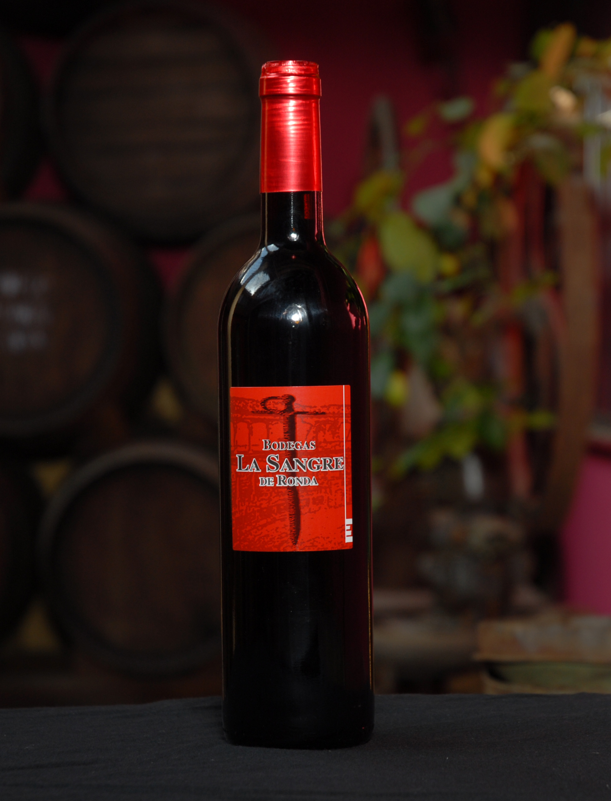 Vino Tinto Crianza Bodegas La Sangre de Ronda